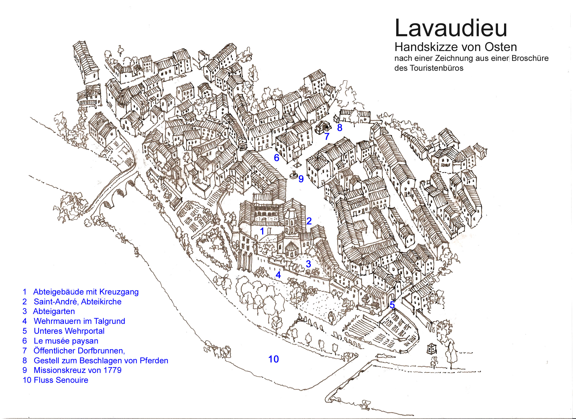 Lavoudieu, Handskizze von Osten